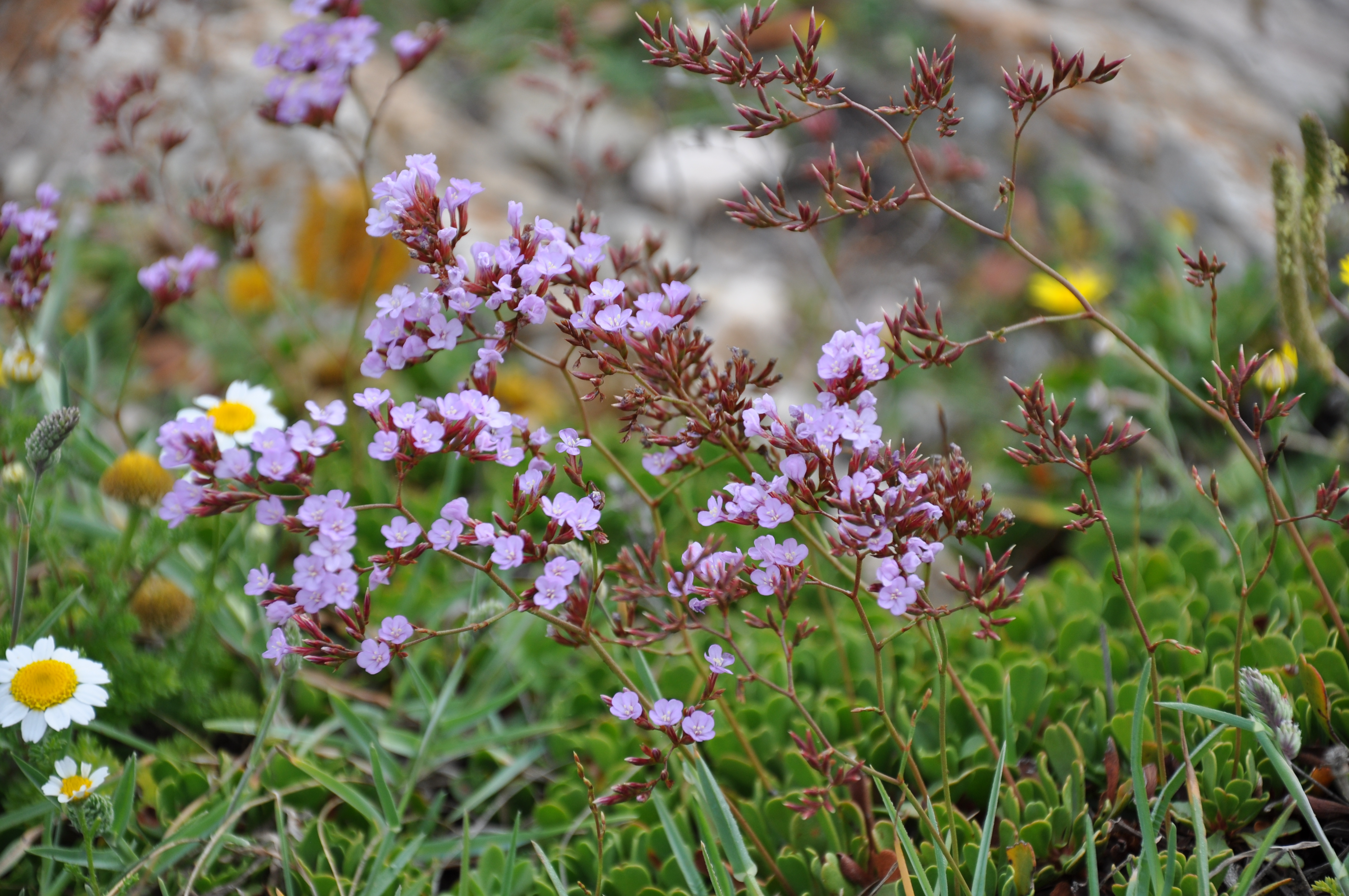 Siempreviva del Estrecho ( Limonium emarginatum ), Ceuta, España.